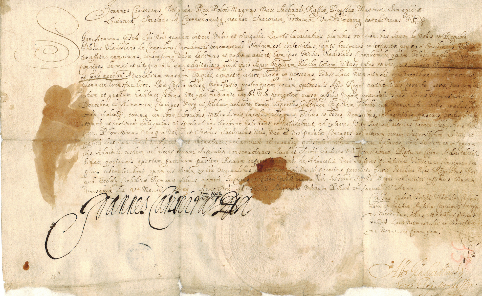 można dodać opis pliku, szerszy